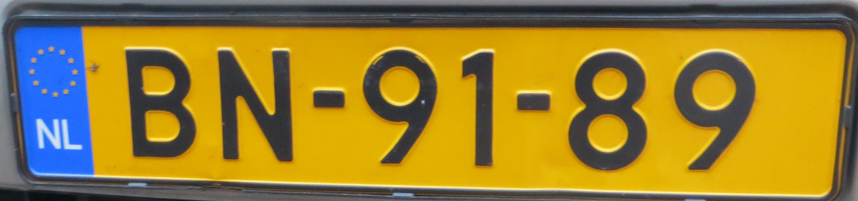 BN kentekenplaat